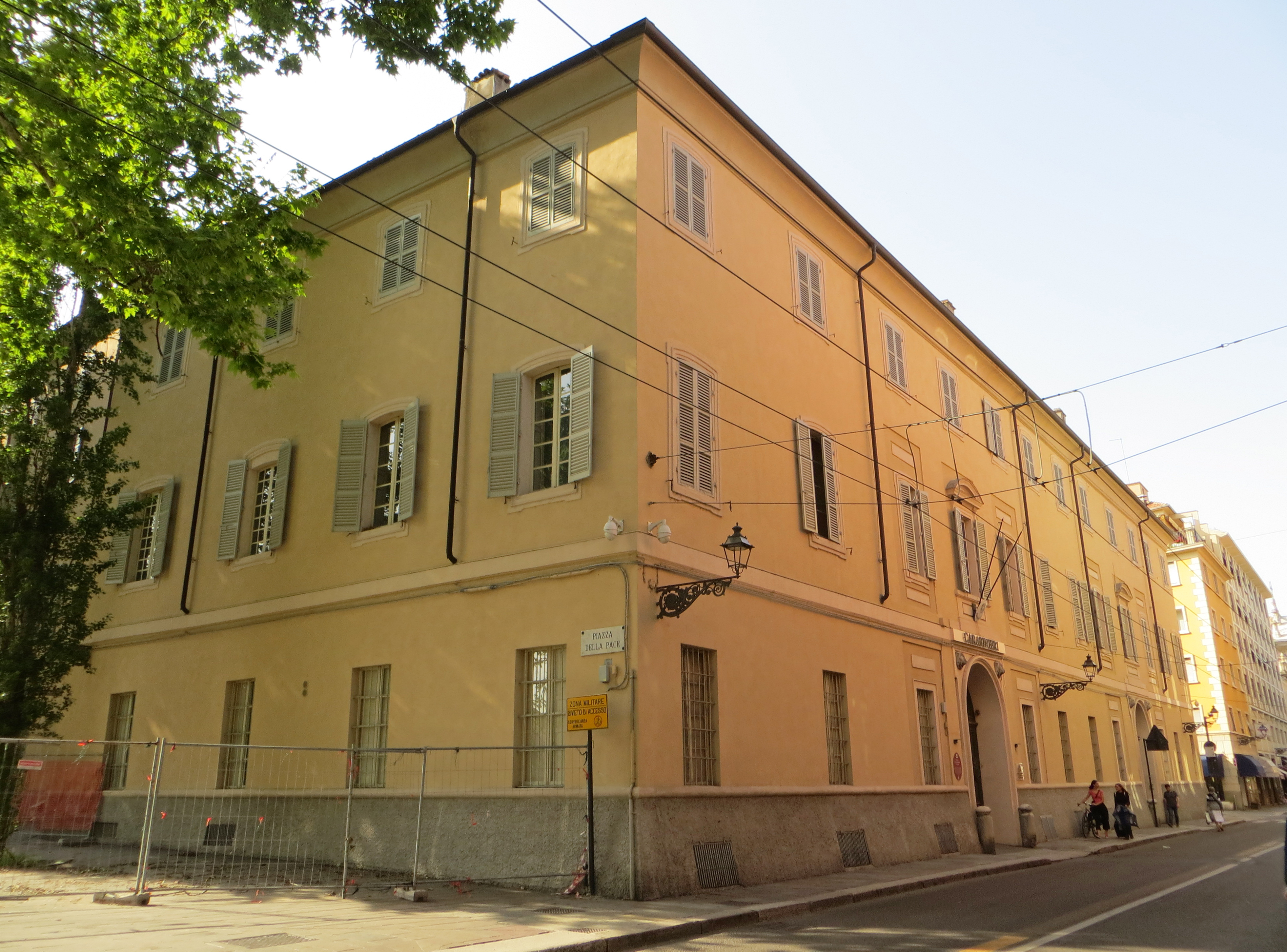 Palazzo dell'Intendenza di Finanza (Parma) - facciata e lato sud